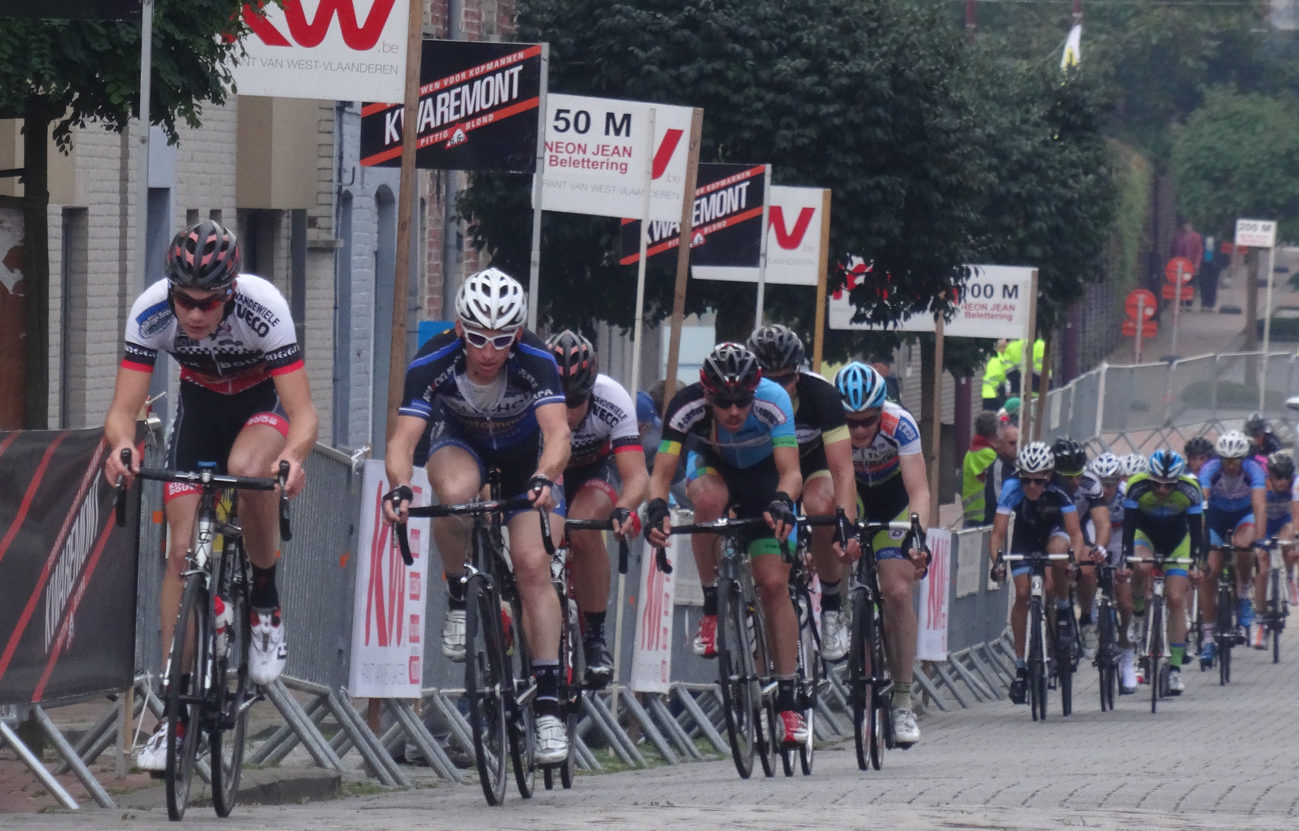 Reportage photographique réalisé le mercredi 24 septembre à l'occasion du départ et du début de la course du Circuit du Houtland 2014 à Lichtervelde, Belgique.